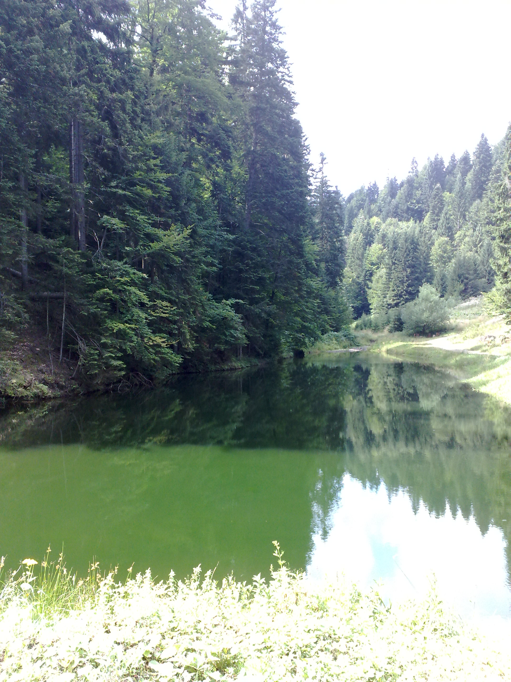 Језеро (језерце) Јаревац на планини Тари, у насељу Рачанска Шљивовица